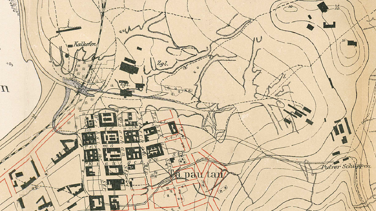 青岛大窑沟孟家沟一带地形图